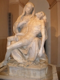 Pietà del Gagini Soverato